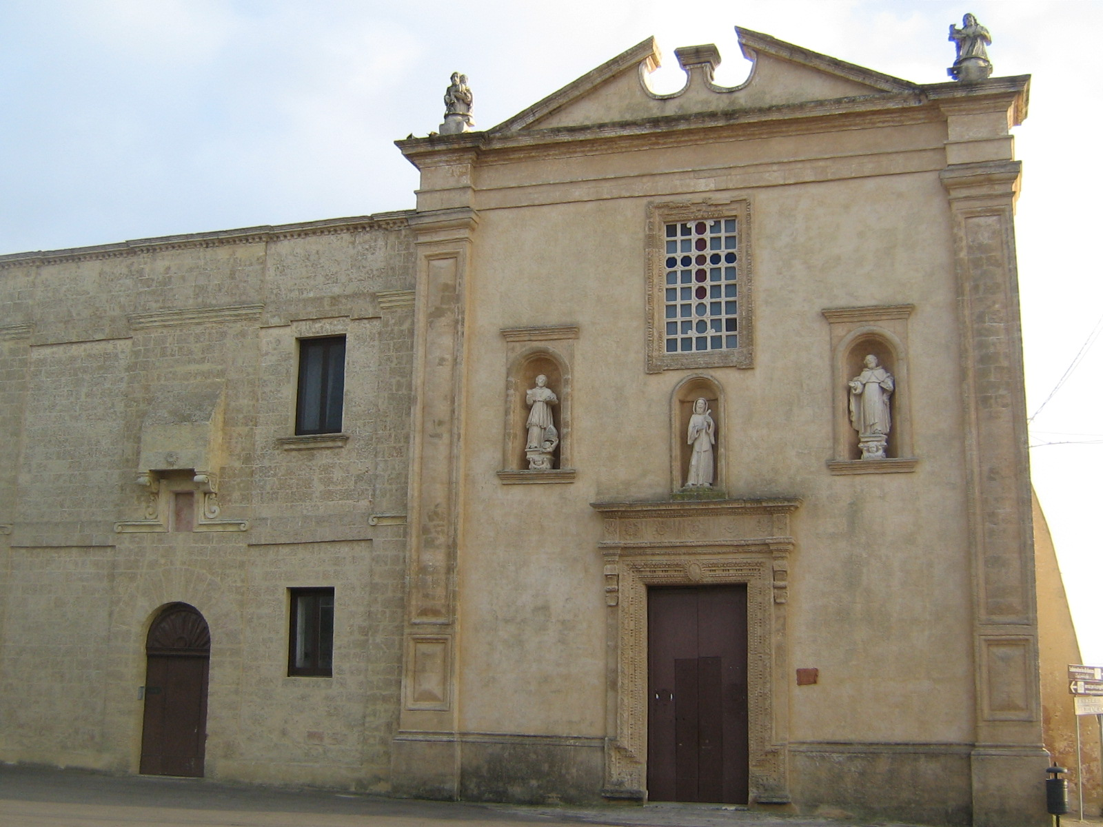 Chiesa del Convento Gagliano del Capo, Lecce, Italy